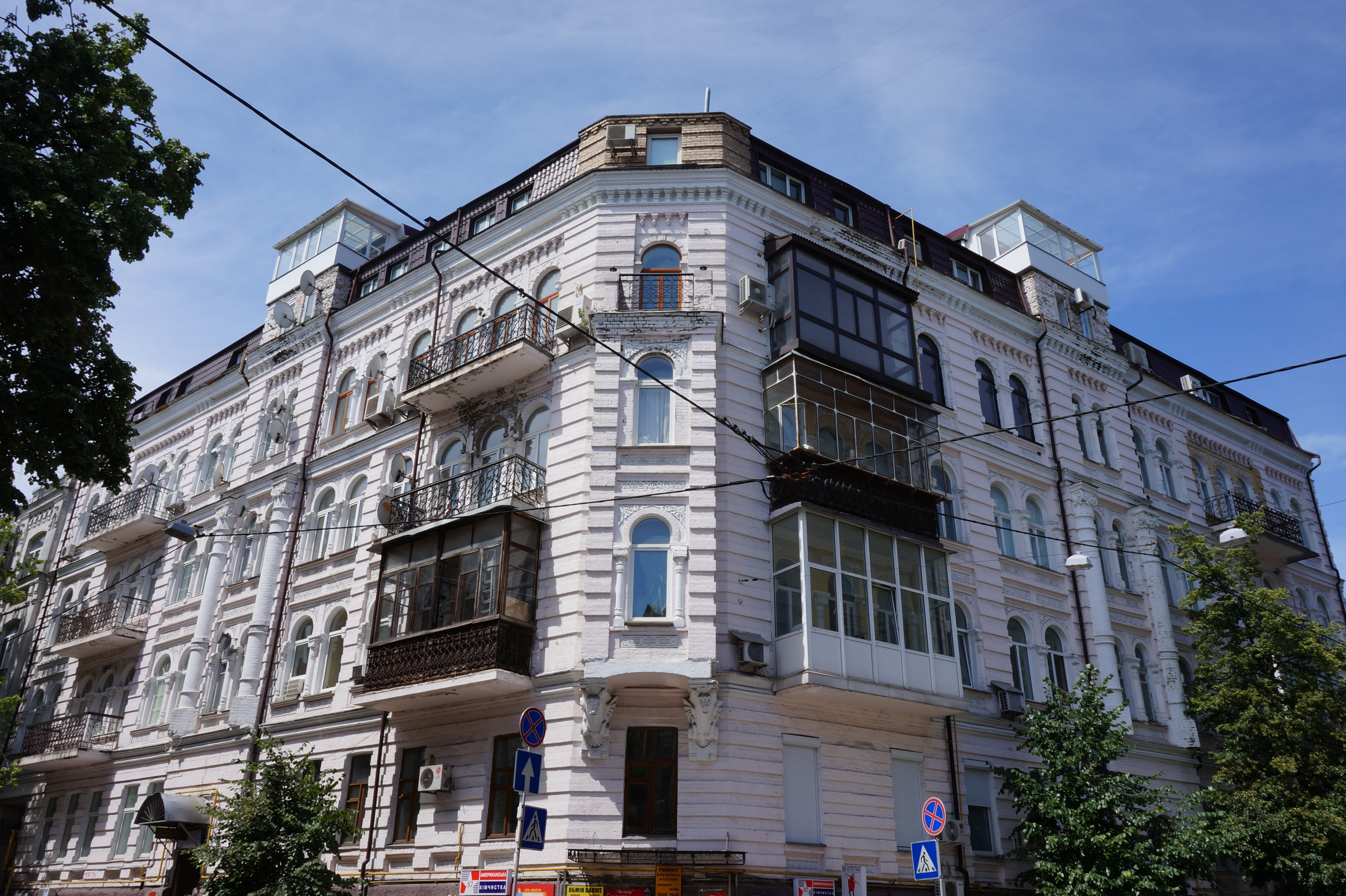 Житловий будинок, в якому проживали П. І. Бєлоусов, адвокат, політичний діяч та О. С. Кривошеєв, архітектор, Київ, Рейтарська вул., 31/16